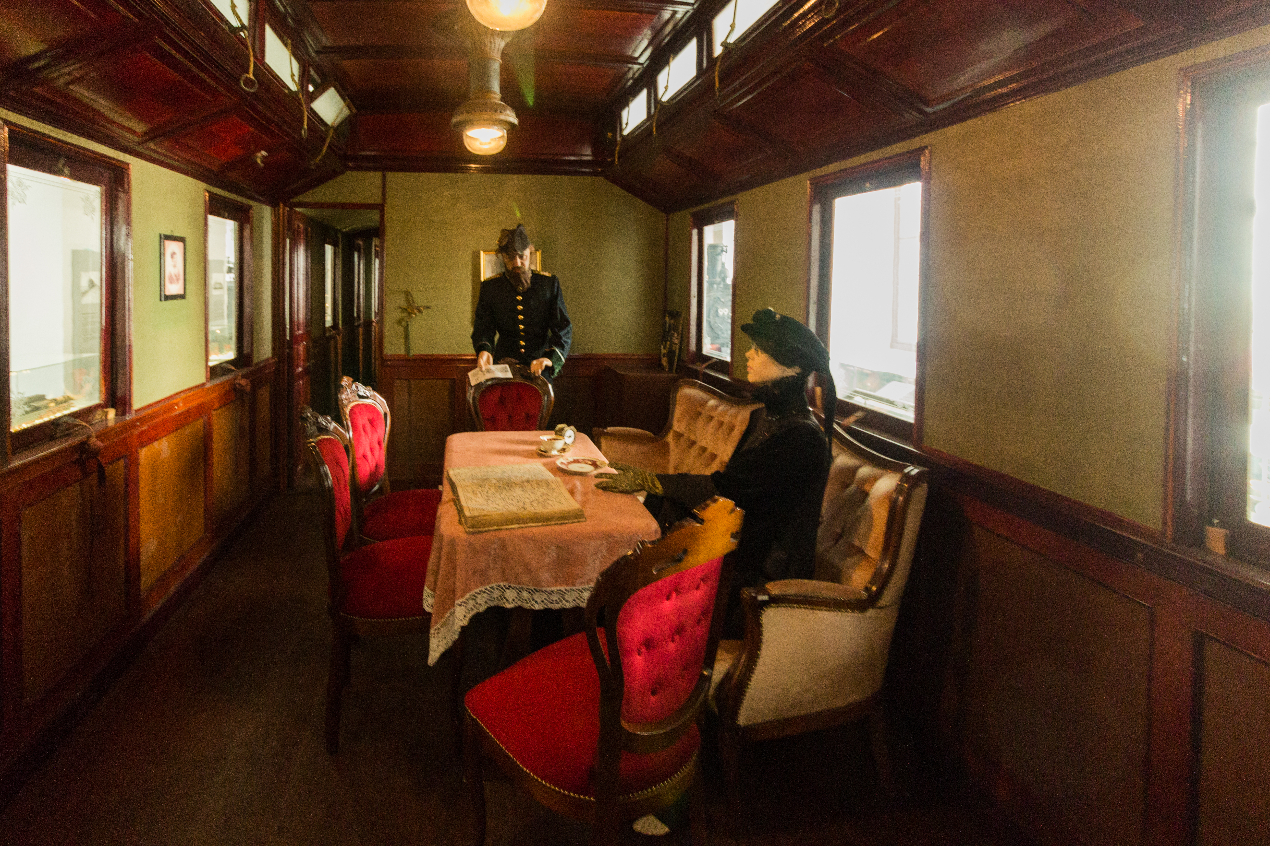 Salonwagen 447 innen - Verkehrsmuseum Dresden